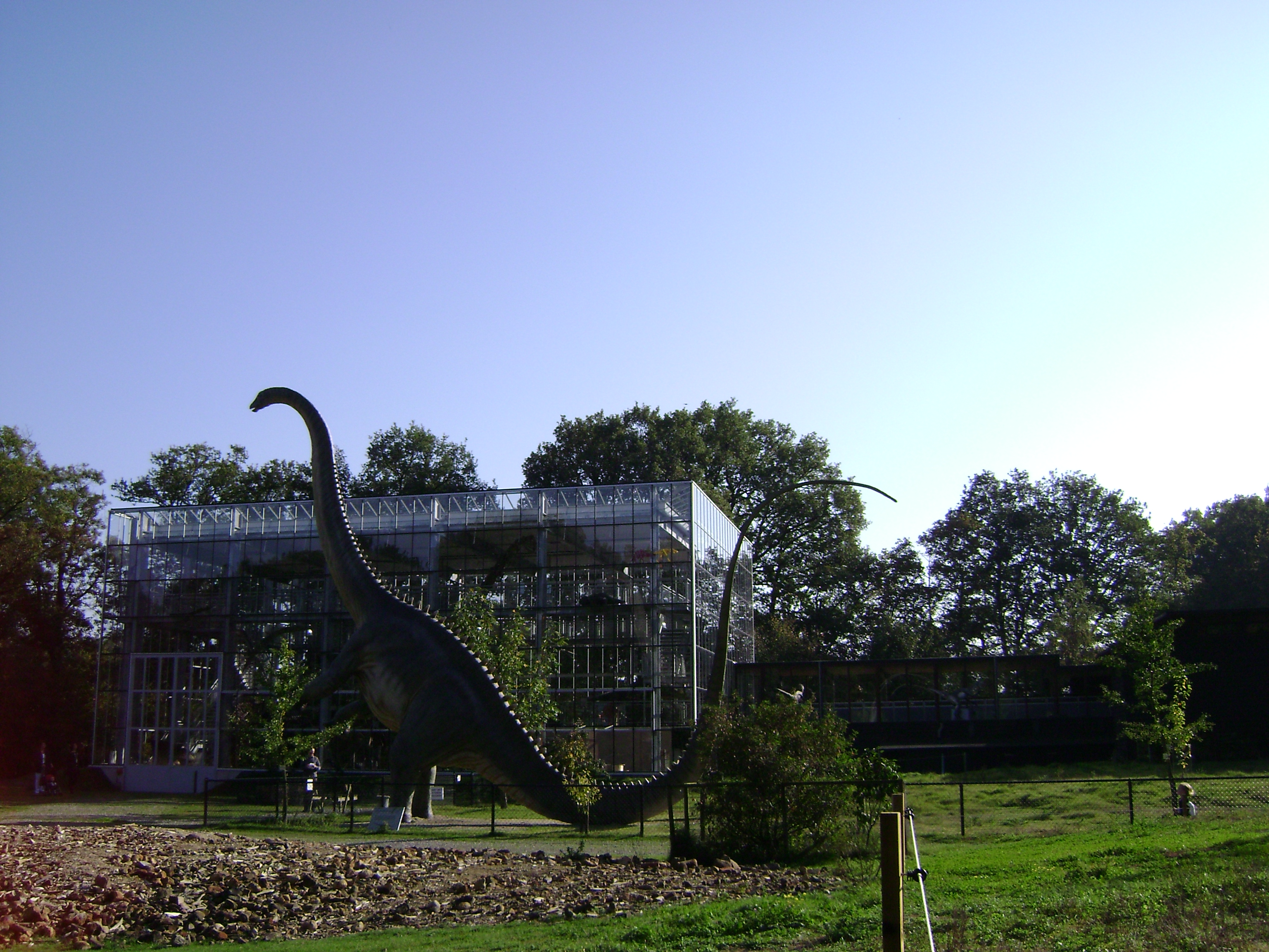 Oertijdmuseum De Groene Poort